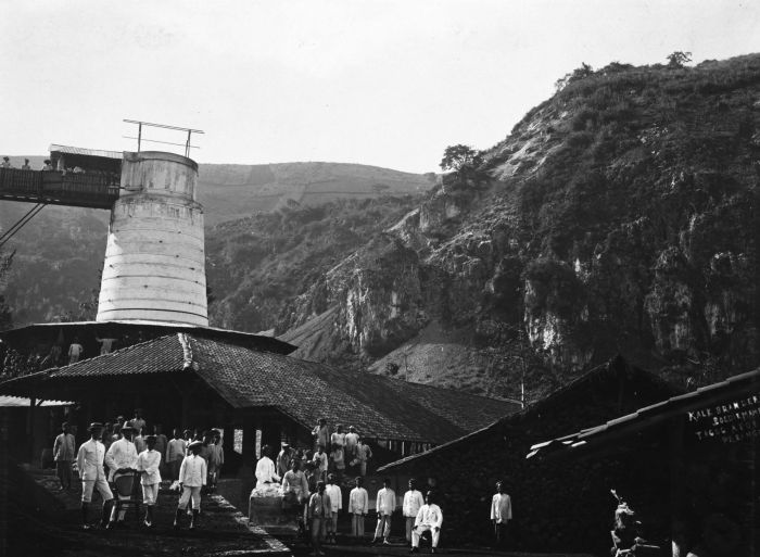 Foto. Medewerkers van een kalkbranderij aan de voet van de kalkrotsen bij Tagogapoe